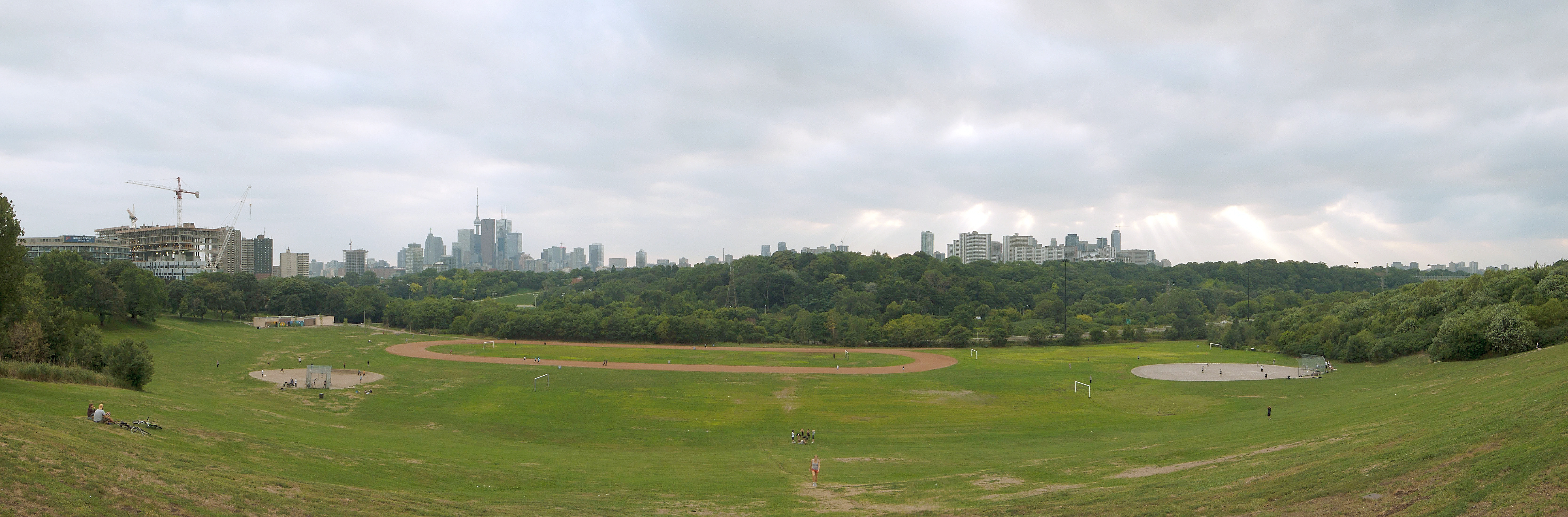 Riverdale Park, Toronto, Ontario, Canada - panorama